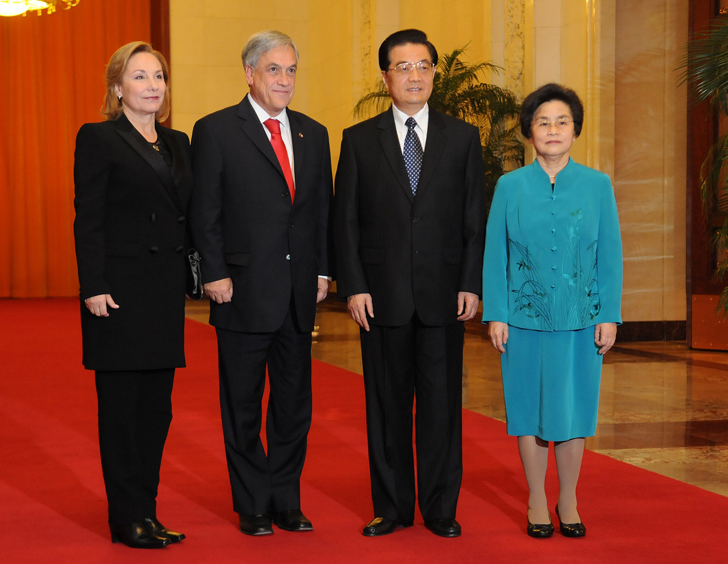 El Presidente de la República, Sebastián Piñera, participó en la ceremonia de Recepción Oficial en el Palacio del Pueblo.